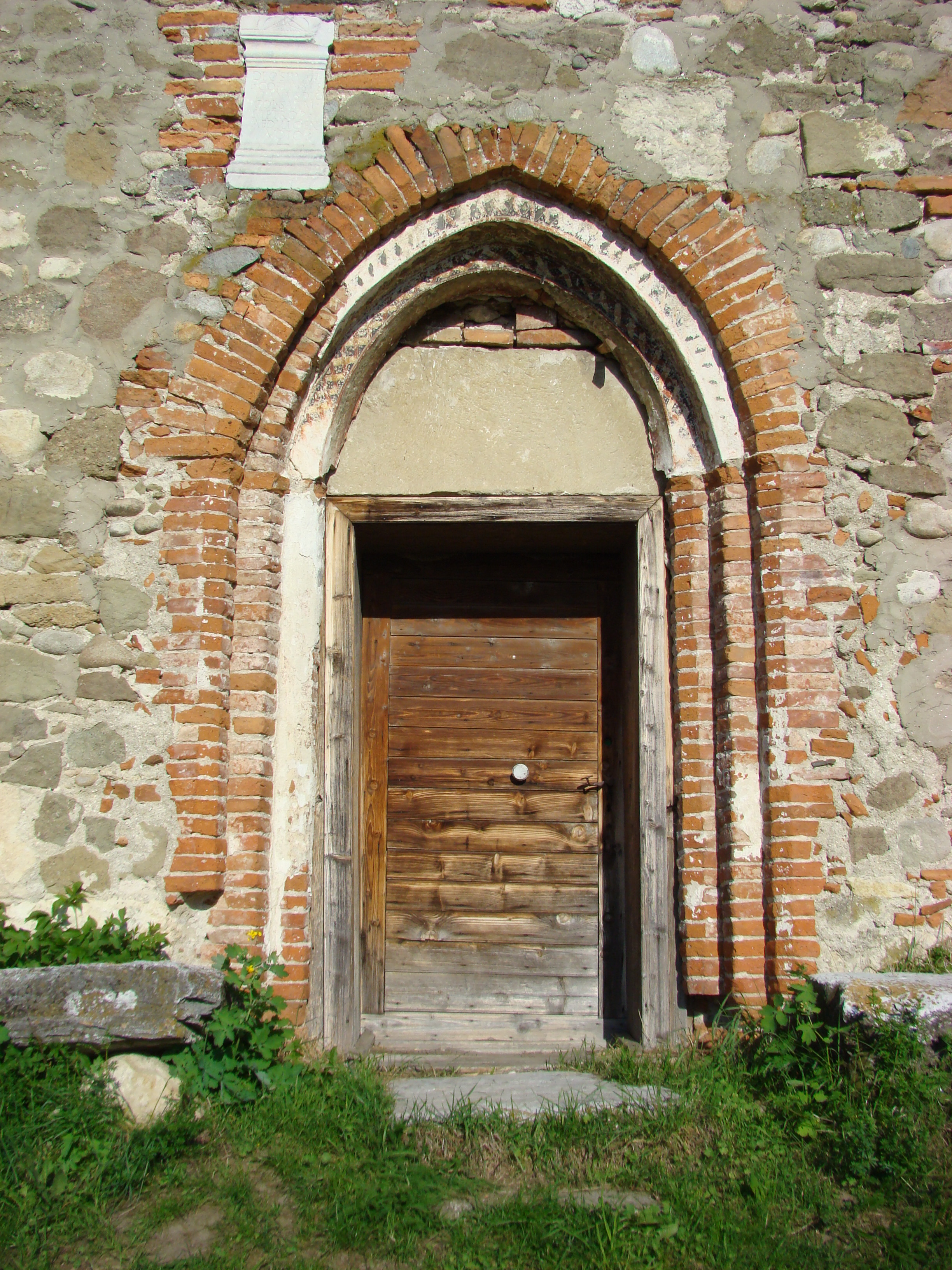 Biserica "Sf. Mare Mucenic Gheorghe", sat SÂNPETRU; comuna SÂNTĂMĂRIA-ORLEA